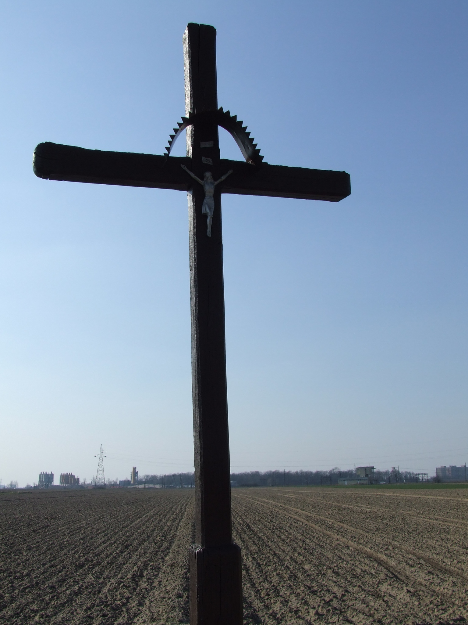 Krzyż przy ul. Garaszewo 2